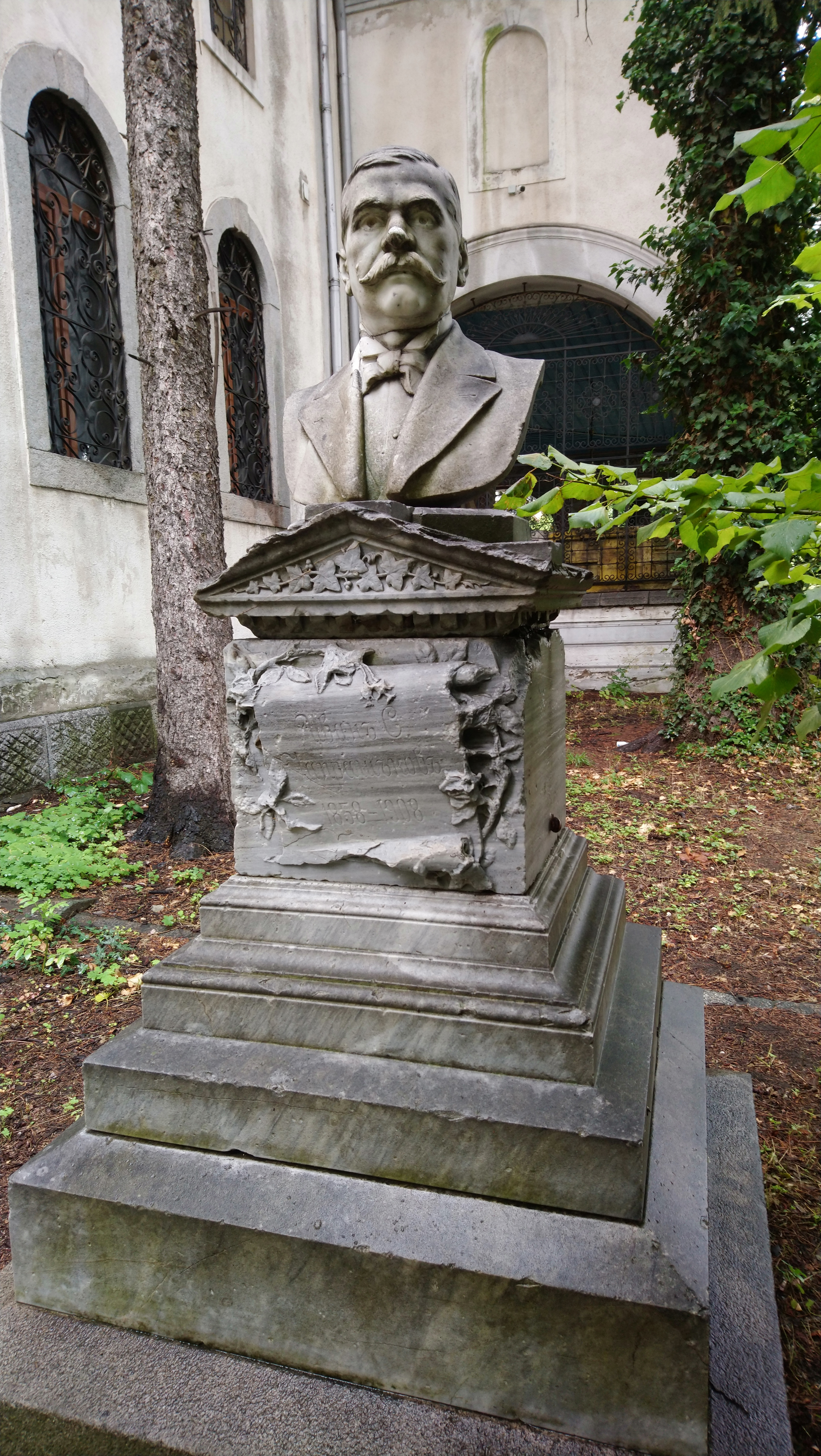 Паметник на Иван Чапрашиков (Чапрашъков), Дупница (1858-1908)